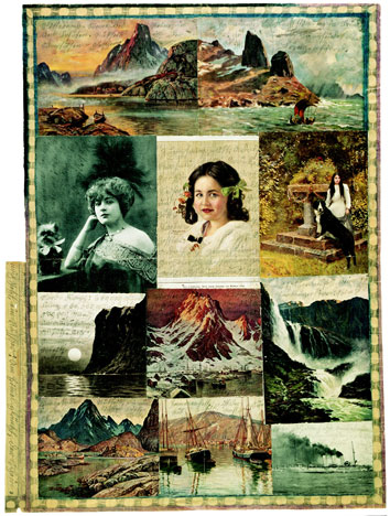 Aus: Hefte mit Liedern und Tänzen, Heft 15, S. 383.